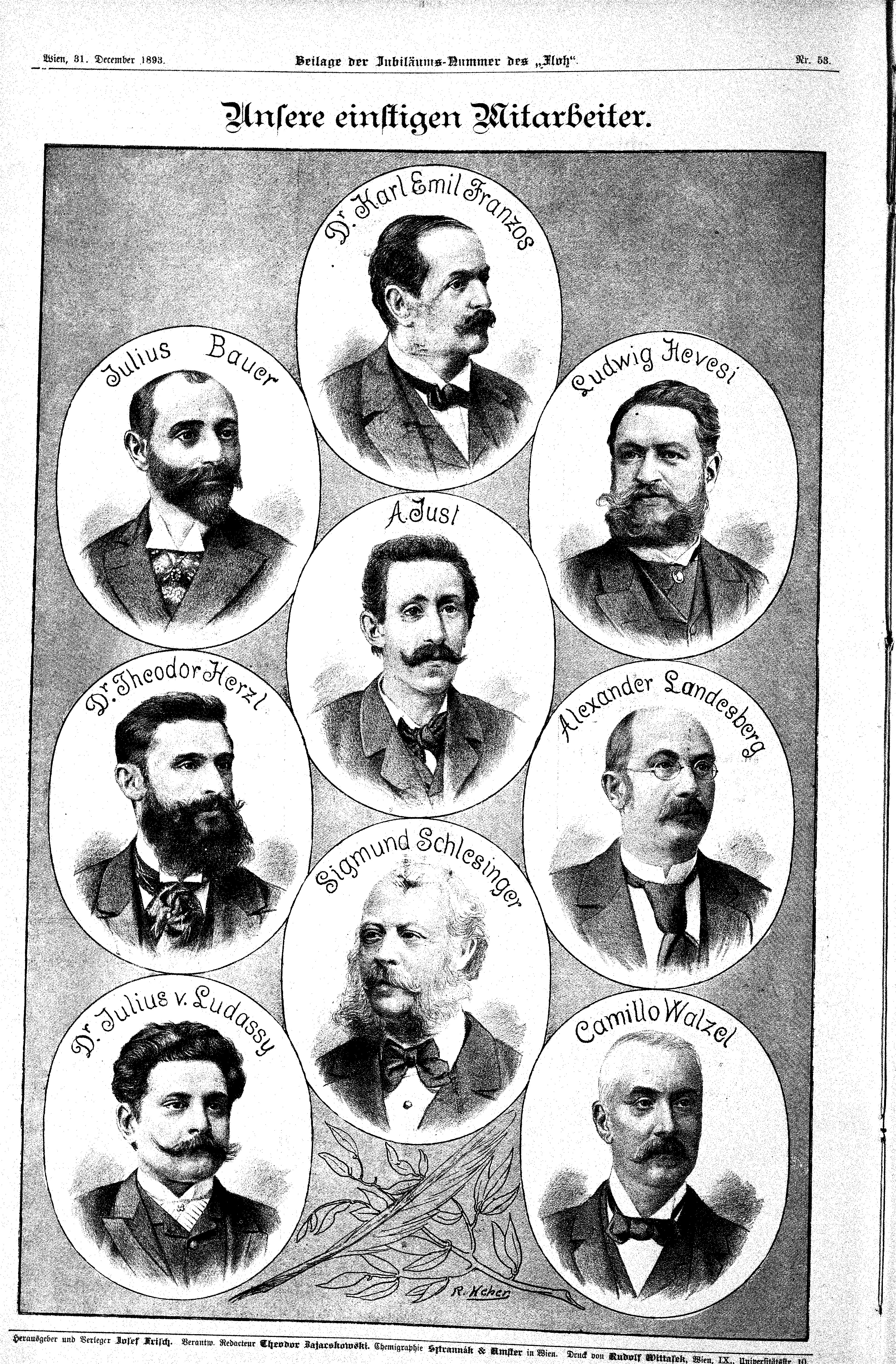 Portraits von einstigen Mitarbeitern der Zeitschrift Der Floh (Teil 1) Dr. Karl Emil Franzos (de) (1848-1904), Austrian writer and publisher VIAF Julius Bauer (1853-1941), German writer, librettist and journalist VIAF Ludwig Hevesi (de) (1843-1910), Hungarian-Austrian writer and journalist A. Just Dr. Theodor Herzl (de) (1860-1904), Austrian-Hungarian writer, publisher and journalist Alexander Landesberg (1848-1916), Romanian-Austrian journalist, librettist and writer VIAF, VIAF Sigmund Schlesinger (1832-1918), Austrian journalist, librettist and writer ÖBL Dr. Julius von Ludassy (Birth name: Julius Gans von Lúdassy; 1858-1922), Austrian journalist and writer VIAF Camillo Walzel (de) (Artist name: Friedrich Zell; 1829-1895), Austrian writer and librettist VIAF (Friedrich Zell)